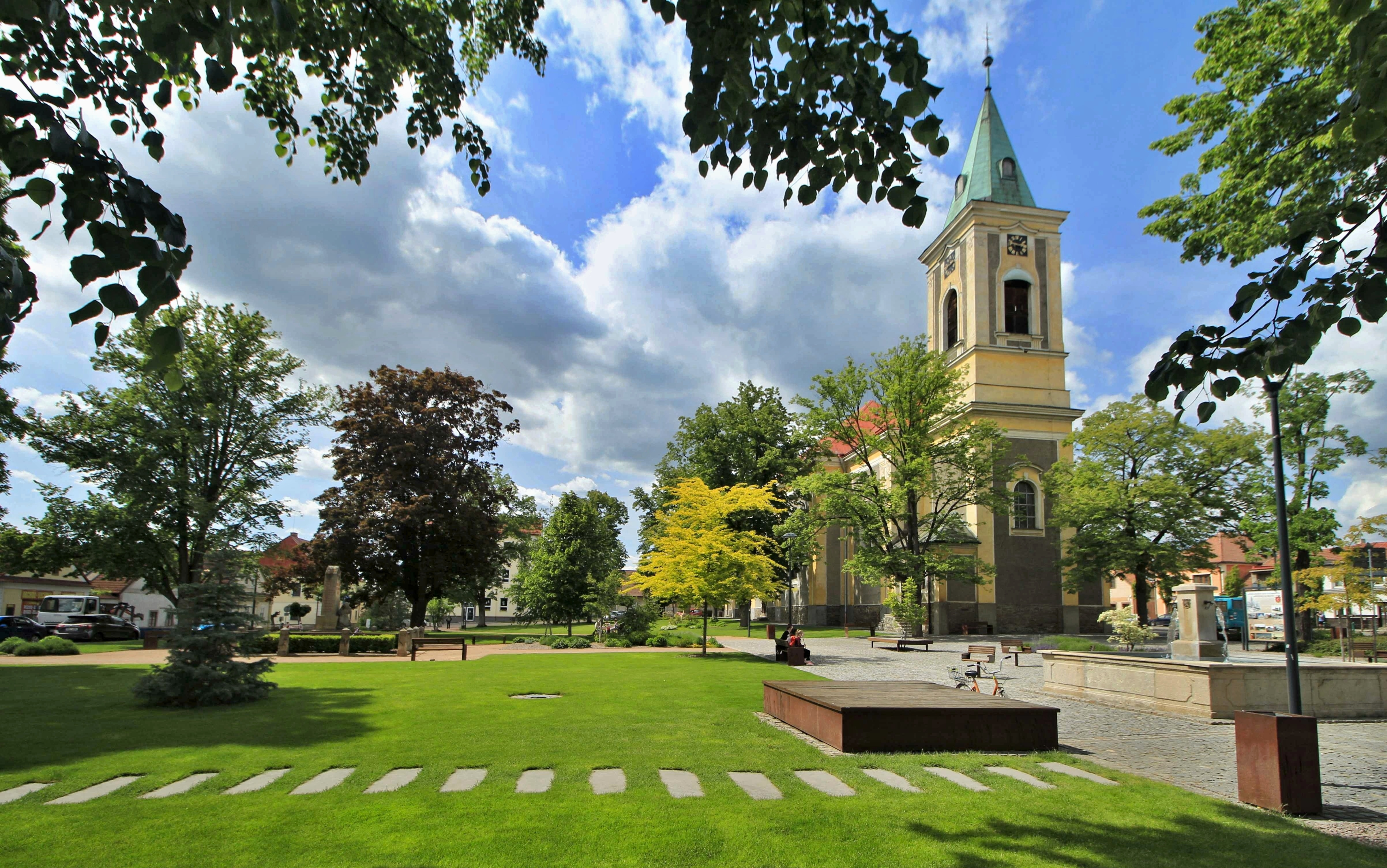 Ronov nad Doubravou, Chitussiho náměstí s kostelem sv. Vavřince